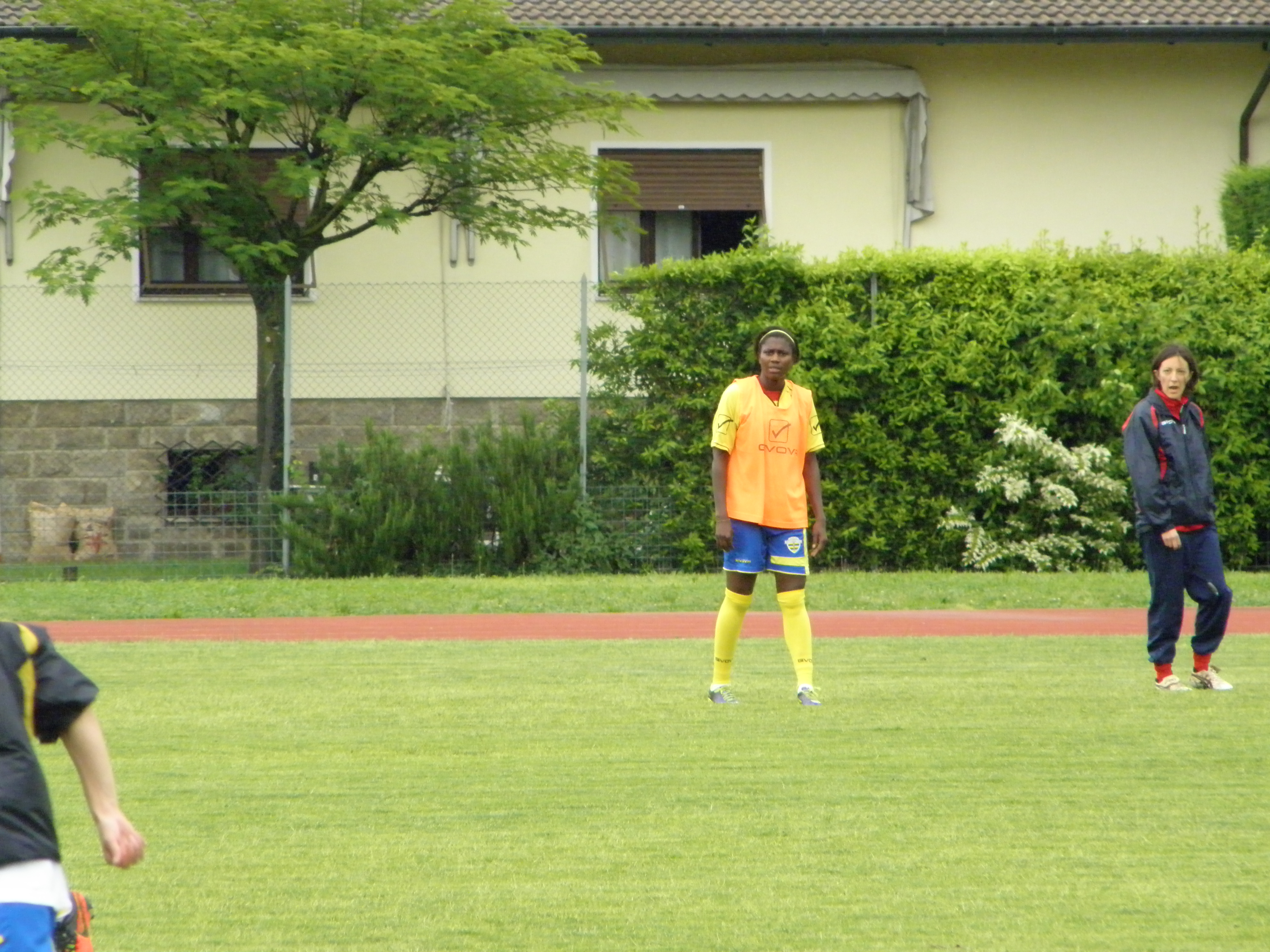 Abano Terme, 23 maggio 2015, finale di Coppa Italia di calcio femminile 2014-2015. Bissoli durante il riscaldamento prepartita.